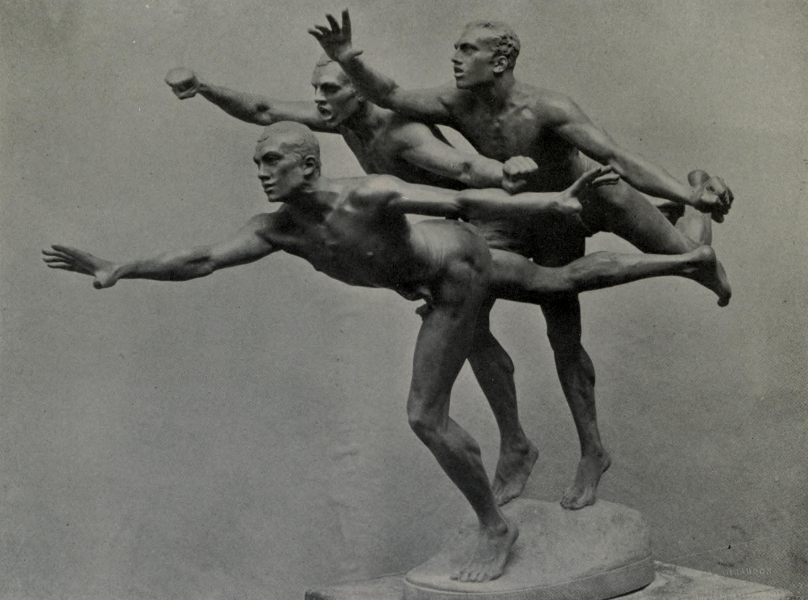 Au But, groupe